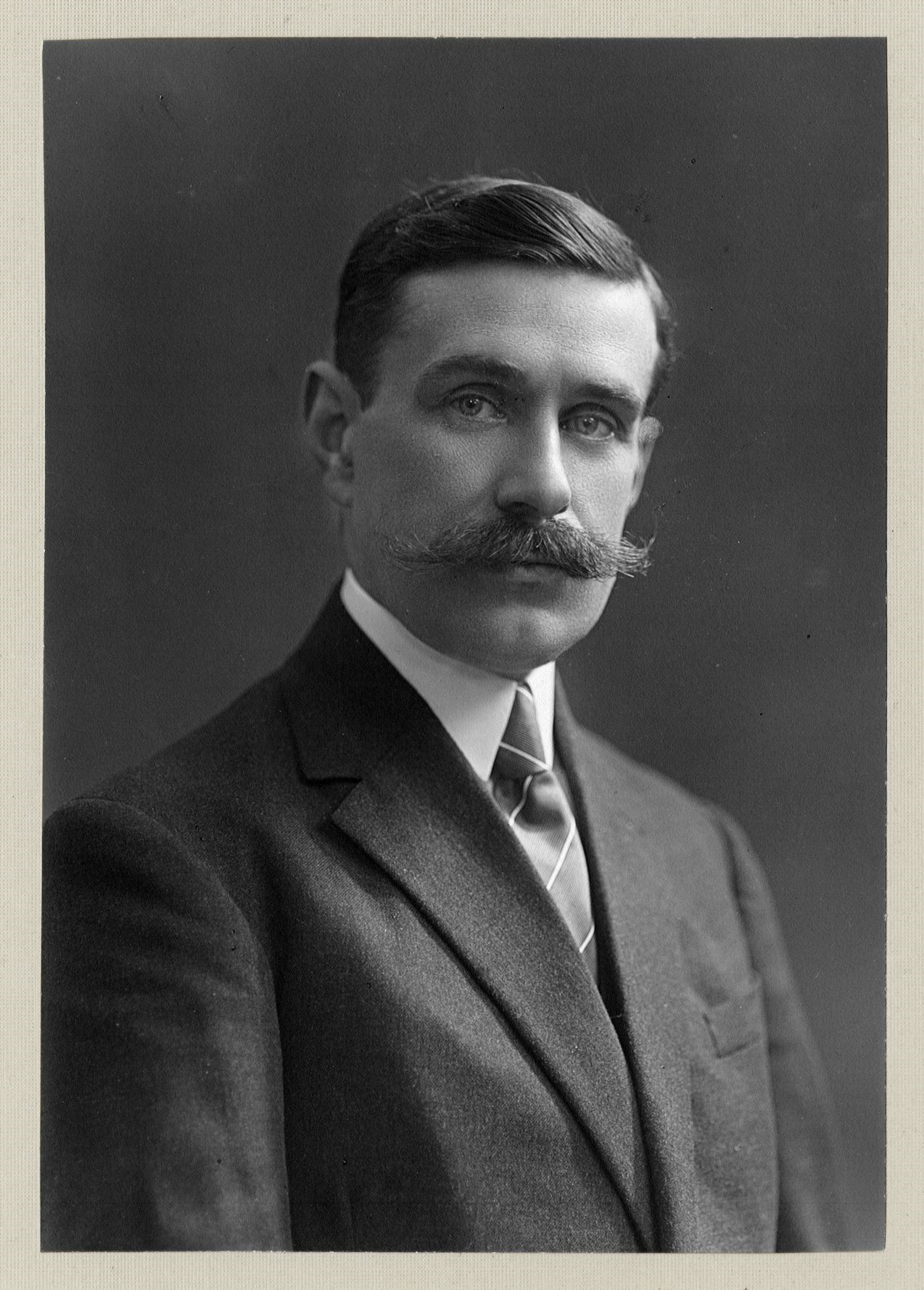 Clément Bressou (1887-1979), en 1926, vétérinaire, professeur d'anatomie à l'École nationale vétérinaire de Toulouse puis à celle d'Alfort, directeur de l'École vétérinaire d'Alfort